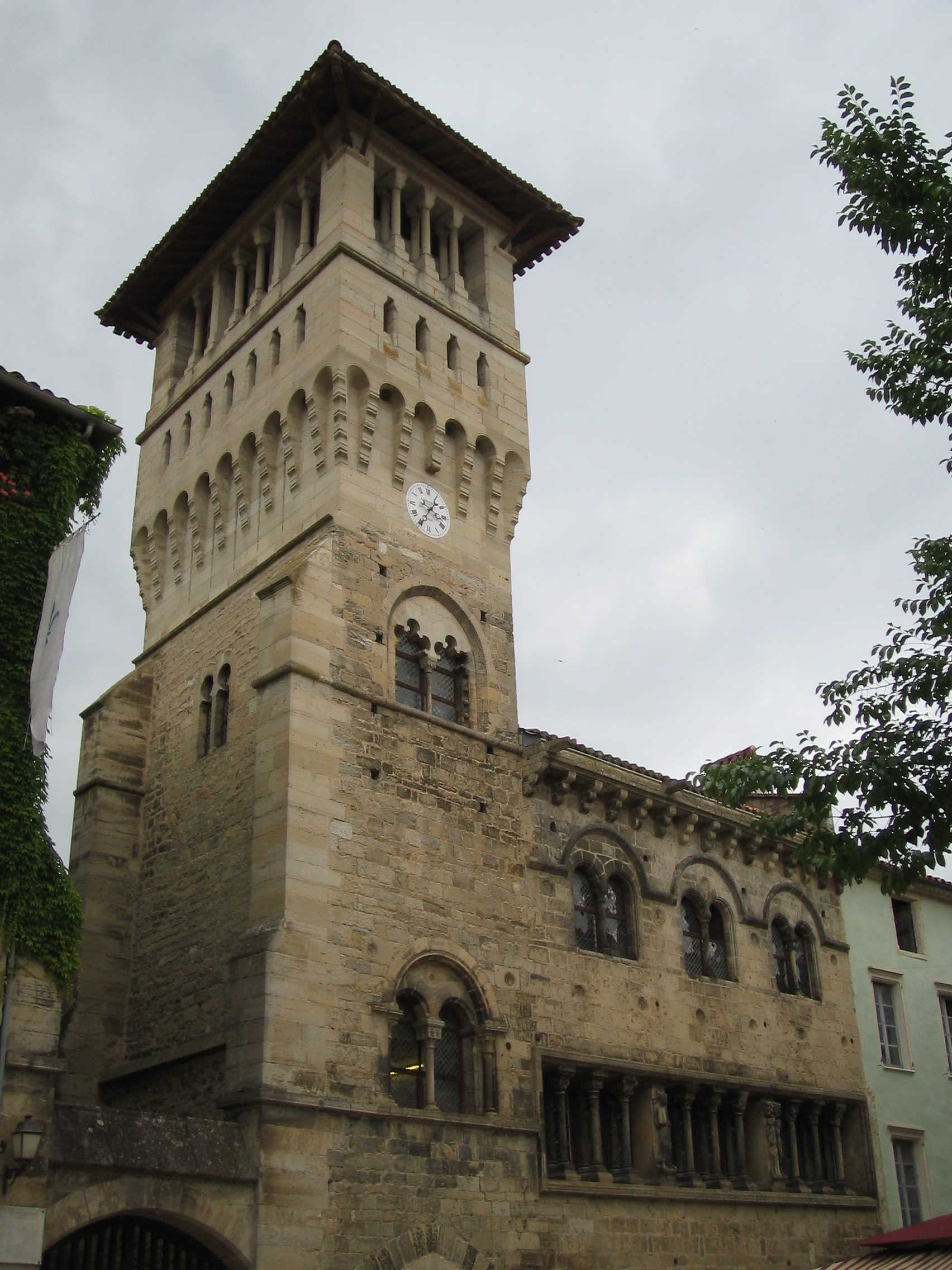 Le beffroi de Saint-Antonin-Noble-Val (Tarn-et-Garonne, France), le plus ancien de France, qui sert actuellement de musée.